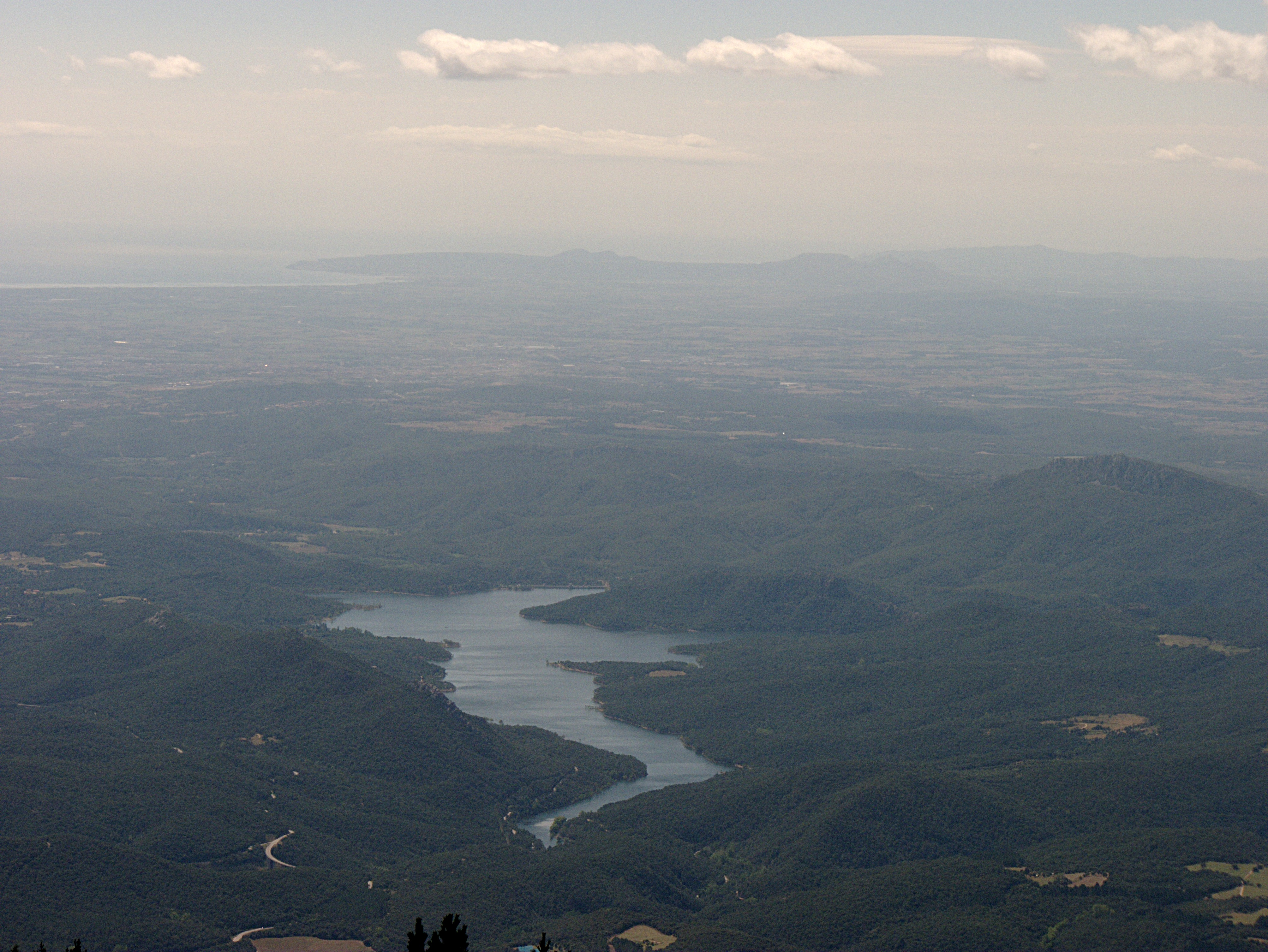 Retenue de Boadella depuis le Roc de France, Darnius (Haut-Ampurdan, Gérone, Catalogne, Espagne)